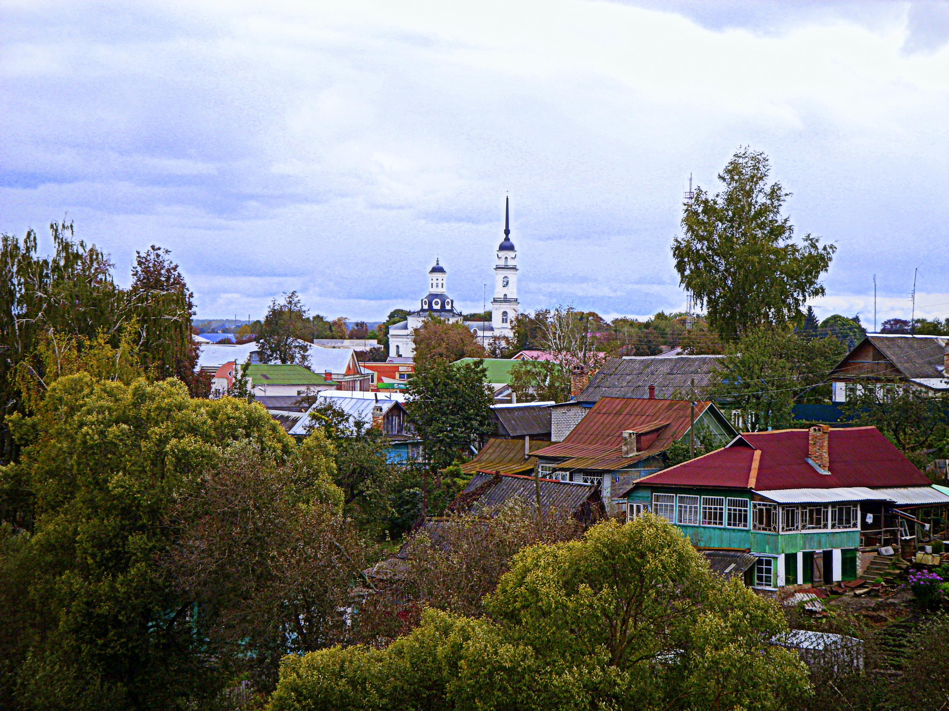 Собор Воскресенский (церковь Вознесения) (Брянская область, Почеп, Октябрьская площадь)